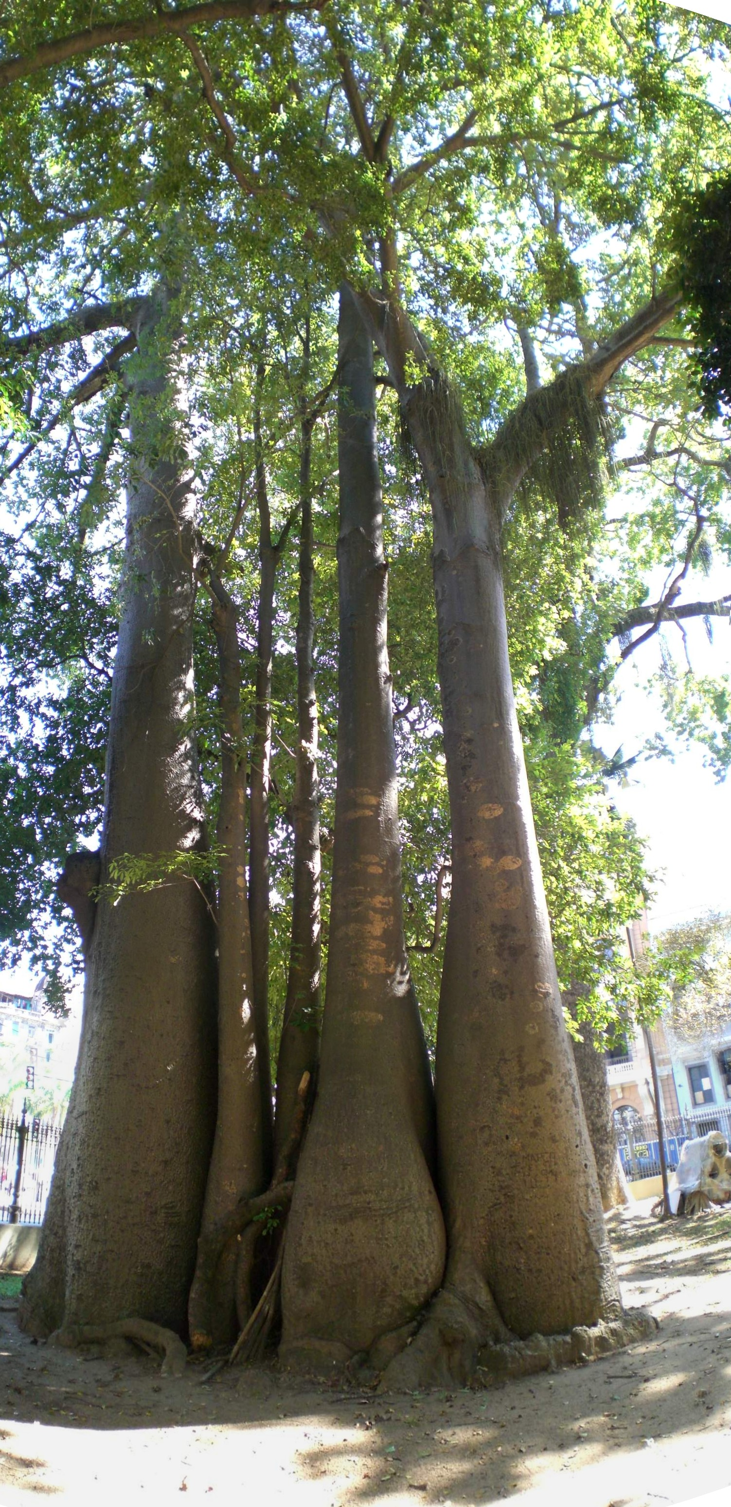 Foto de um baobá que eu tirei, do parque Passeio Público, no centro da cidade.